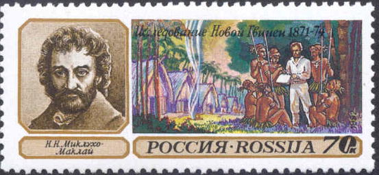 Почтовая марка России из серии «Географические открытия», выпущенная 23 июня 1992 года и посвящённая Н. Н. Миклухо-Маклаю. На марке представлен портрет Н. Н. Миклухо-Маклая и рисунок, где Н. Н. Миклухо-Маклай находится среди папуасов. Художник — Ю. Левиновский, номер по каталогу ЦФА — 30, тираж — 2,6 млн.